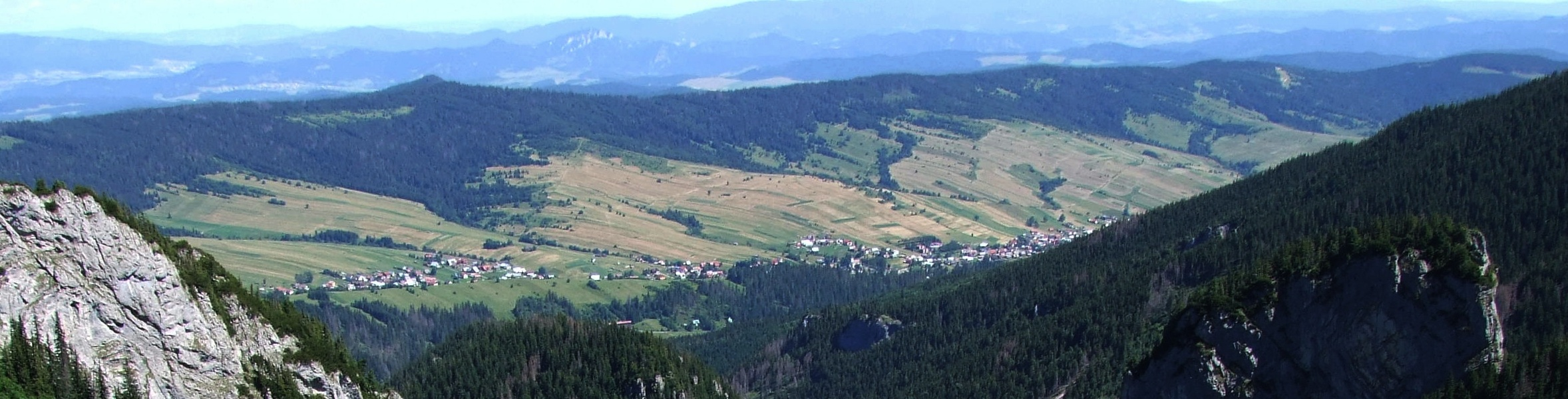 Widok z Szerokiej Doliny Bielskiej na Zdziar, Dolinę Zdziarską i Magurę Spiską. W prawqym dolnym rogu turnia Łasztowica